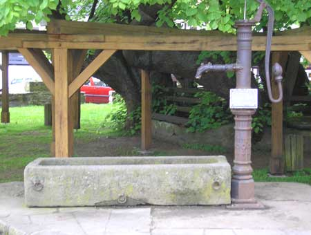 Der St.-Georg-Brunnen am ehemaligen Marktplatz von Schenklengsfeld. selbst fotografiert. 17.05.2006